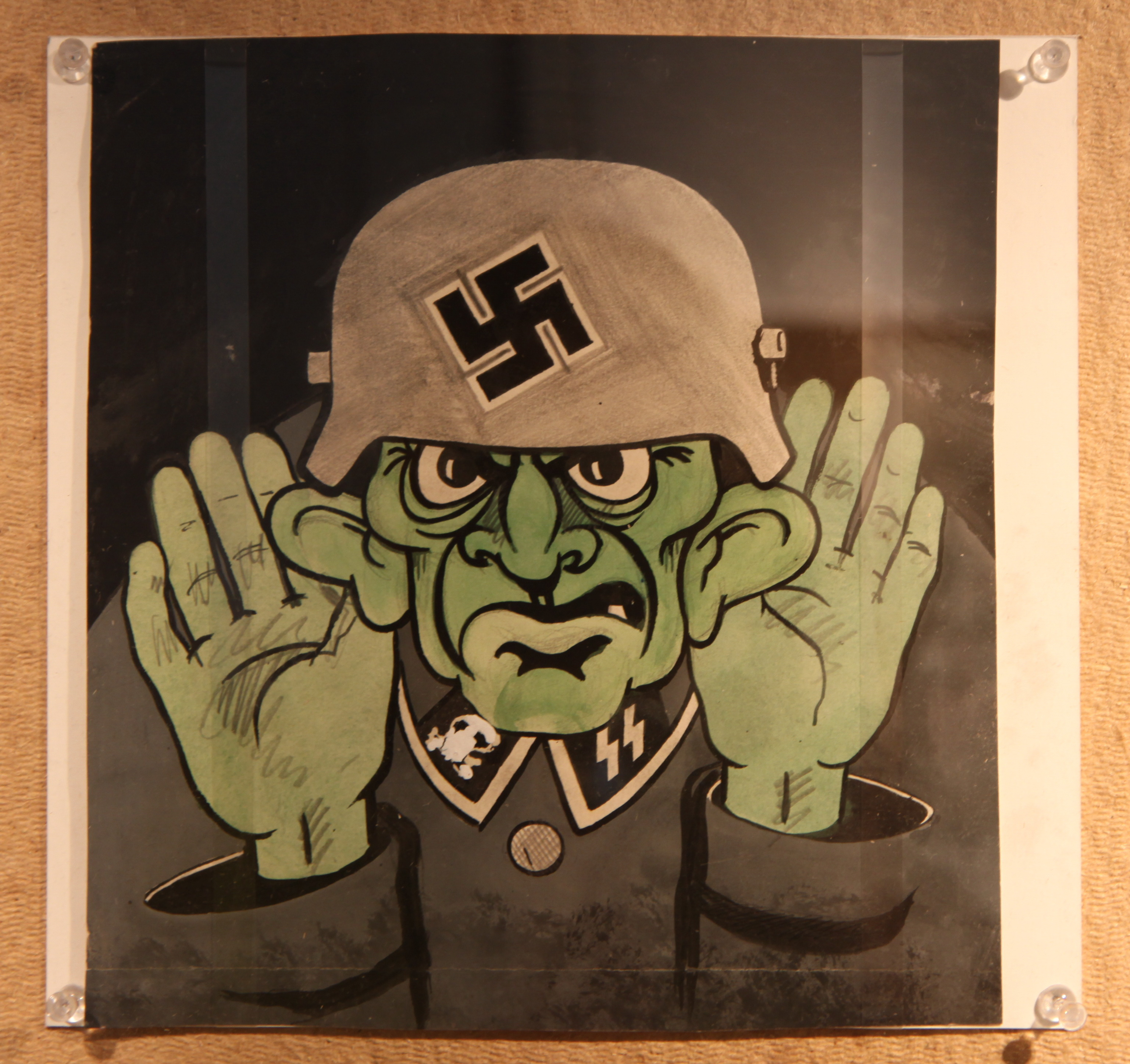 Zonder titel, 1945